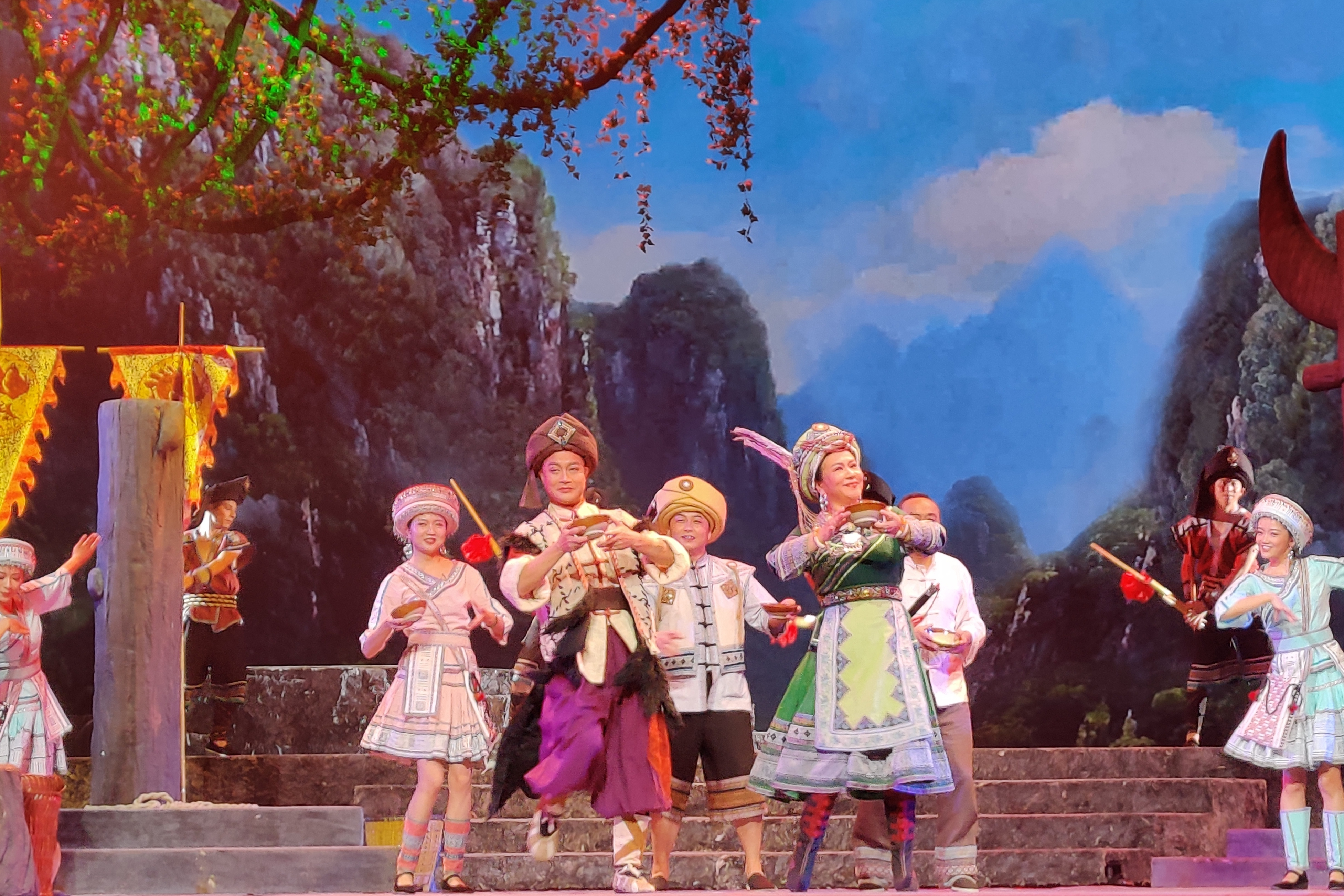 中文（中国大陆）: 第三场 王德三说服陶大嫂